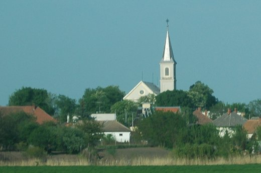 Sekule